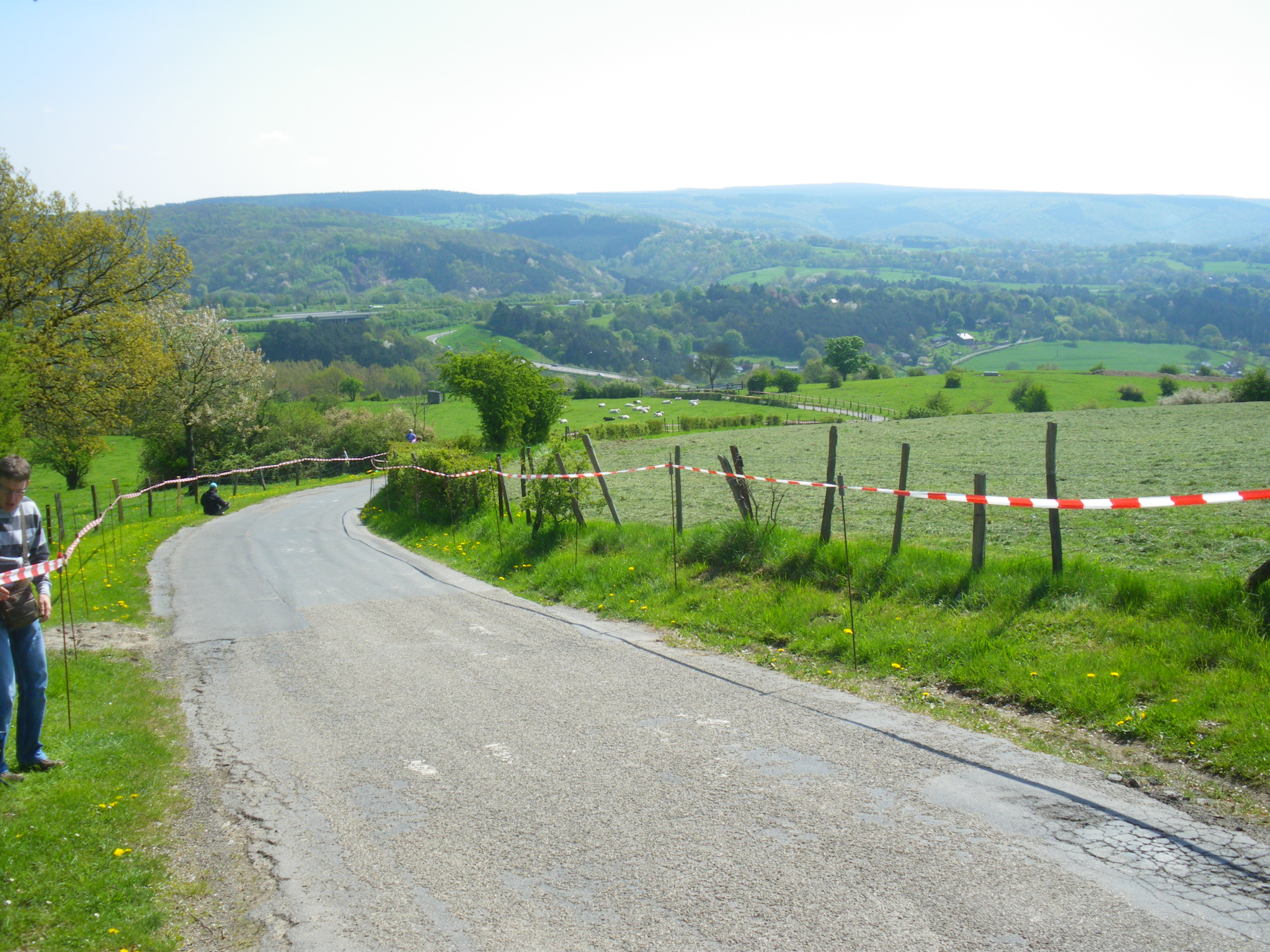 La Redoute in Sougné-Remouchamps